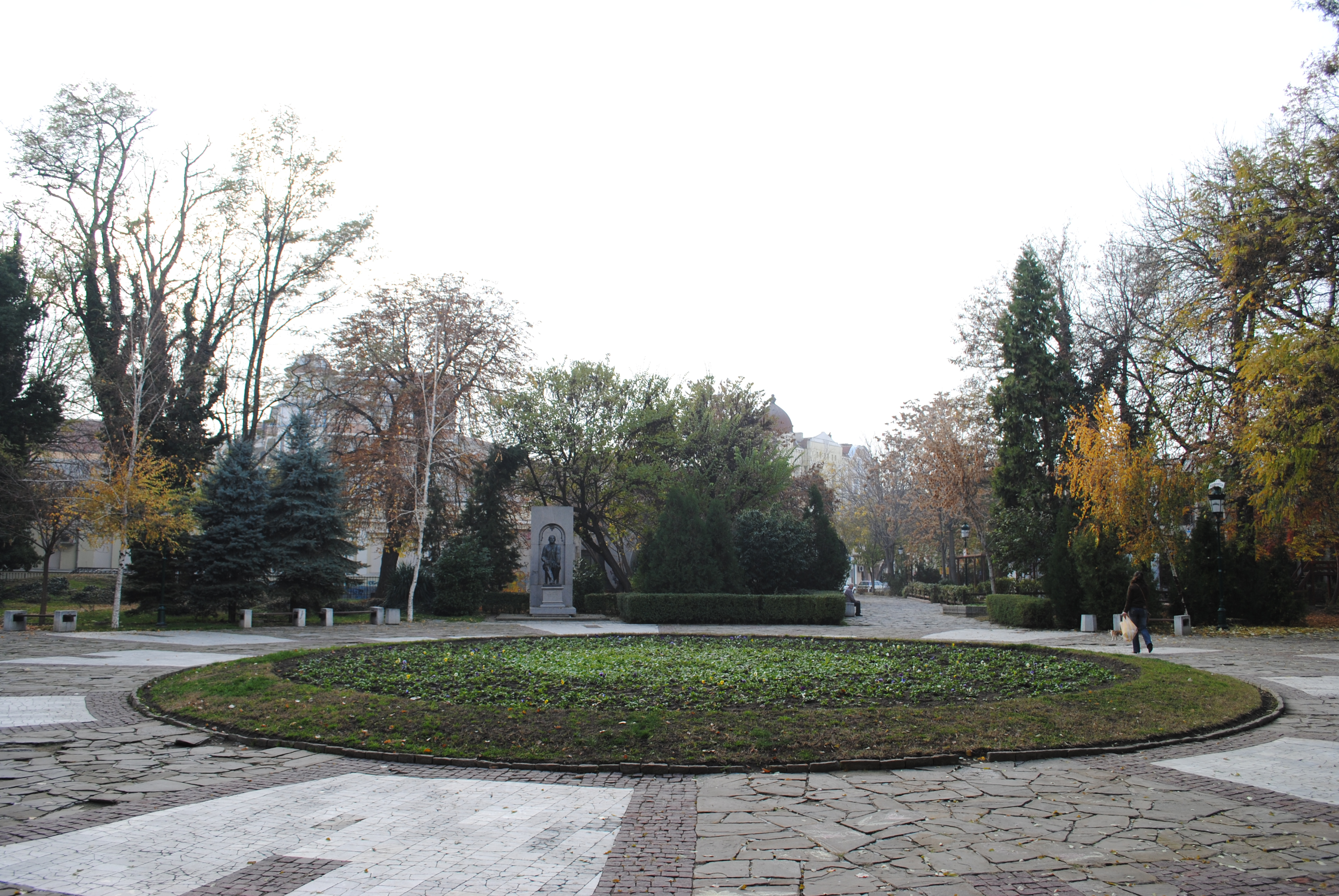 Алея в Дондуковата градина в Пловдив, България.